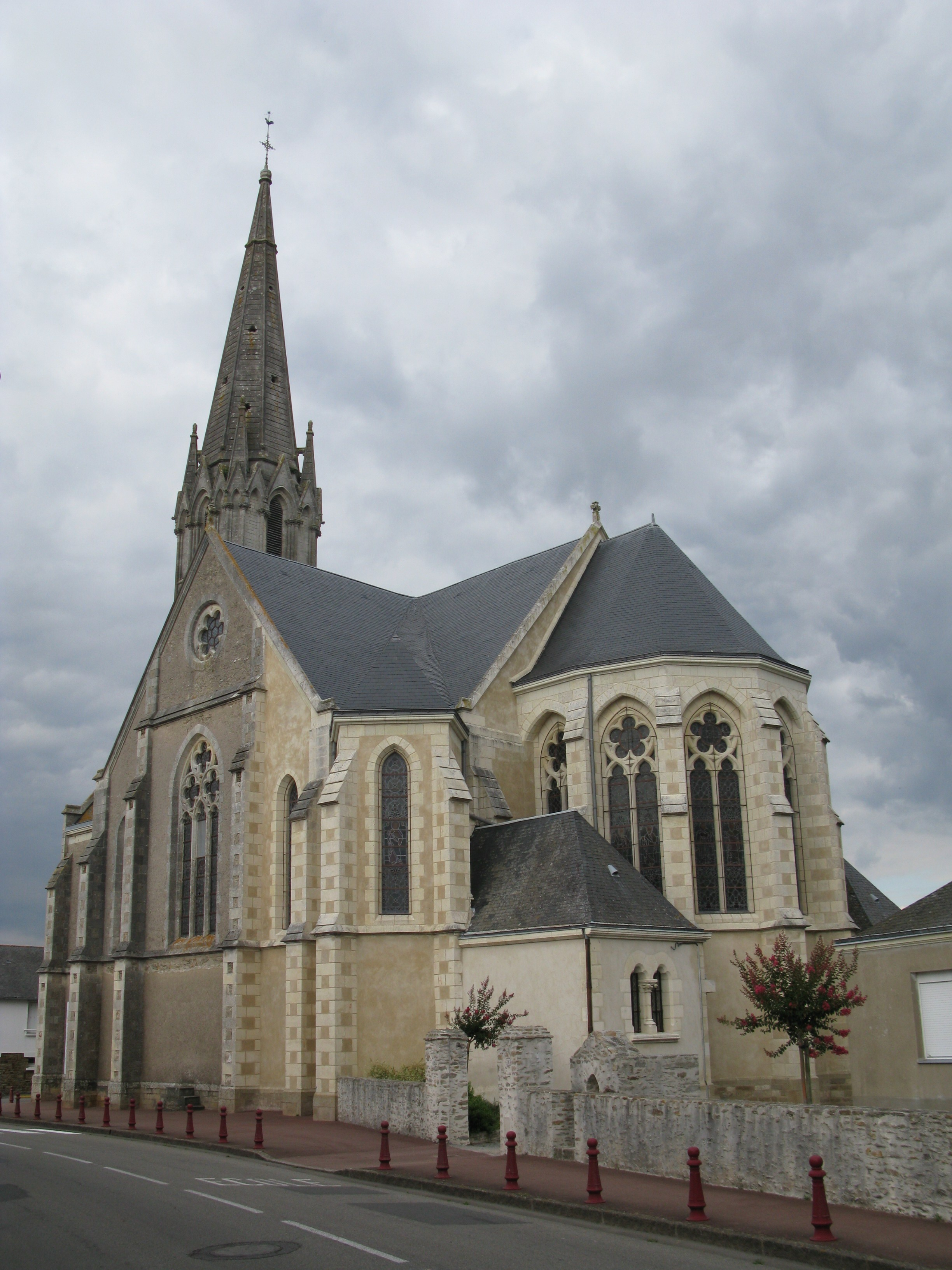 Église de Saint-Même-le-Tenu